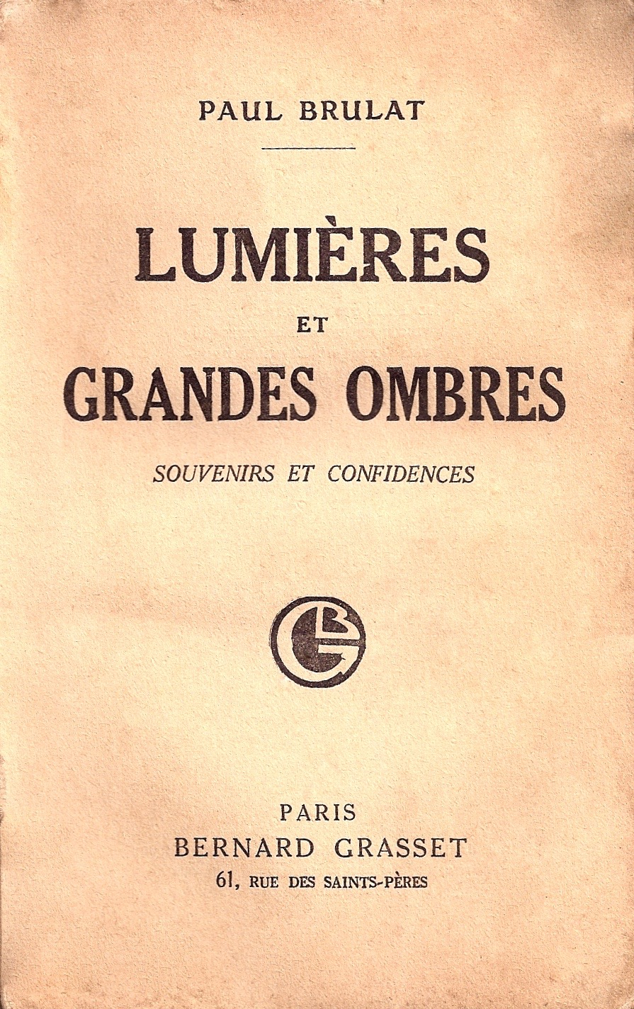 "Lumières et grandes ombres", Paul Brulat, 1930, couverture.